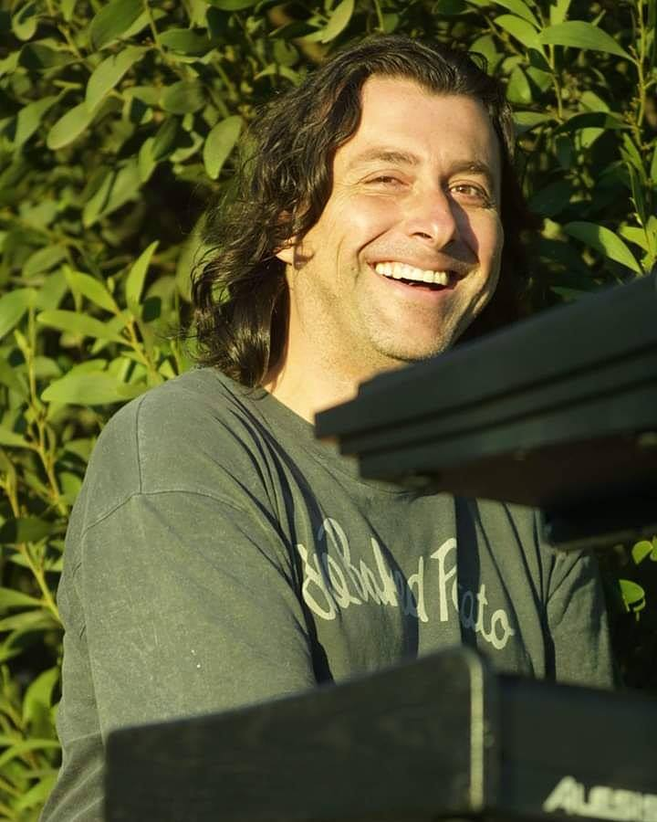 Pianista, tecladista y compositor Jaime Vivanco, de los grupos Congreso, Fulano, y colaborador de muchos proyectos de música chilena.